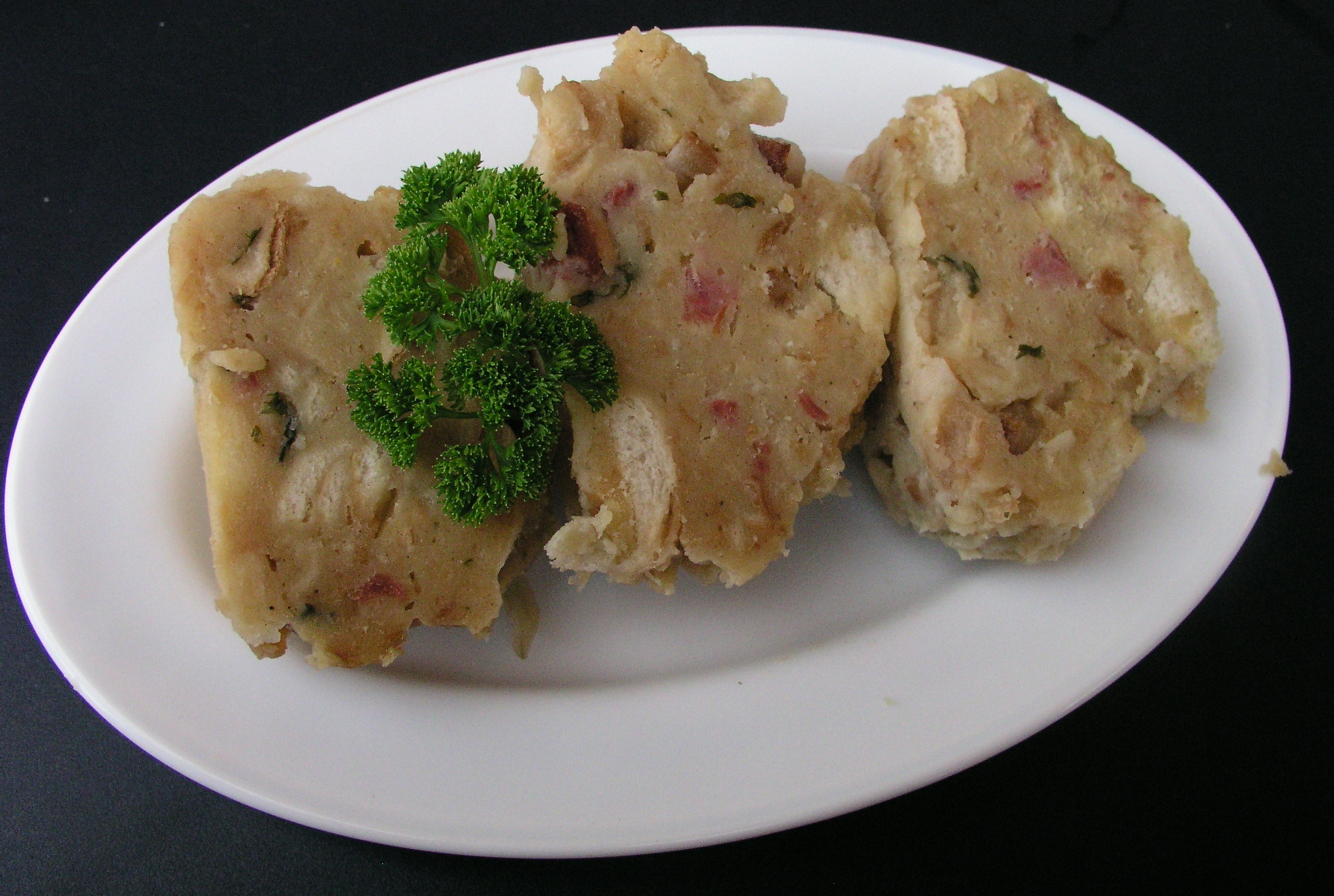 Špekový knedlík